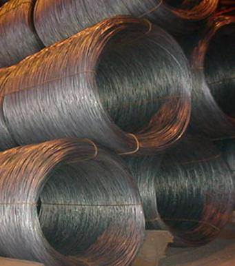 Pila de rollos de alambre dispuestos para su envío al Cliente